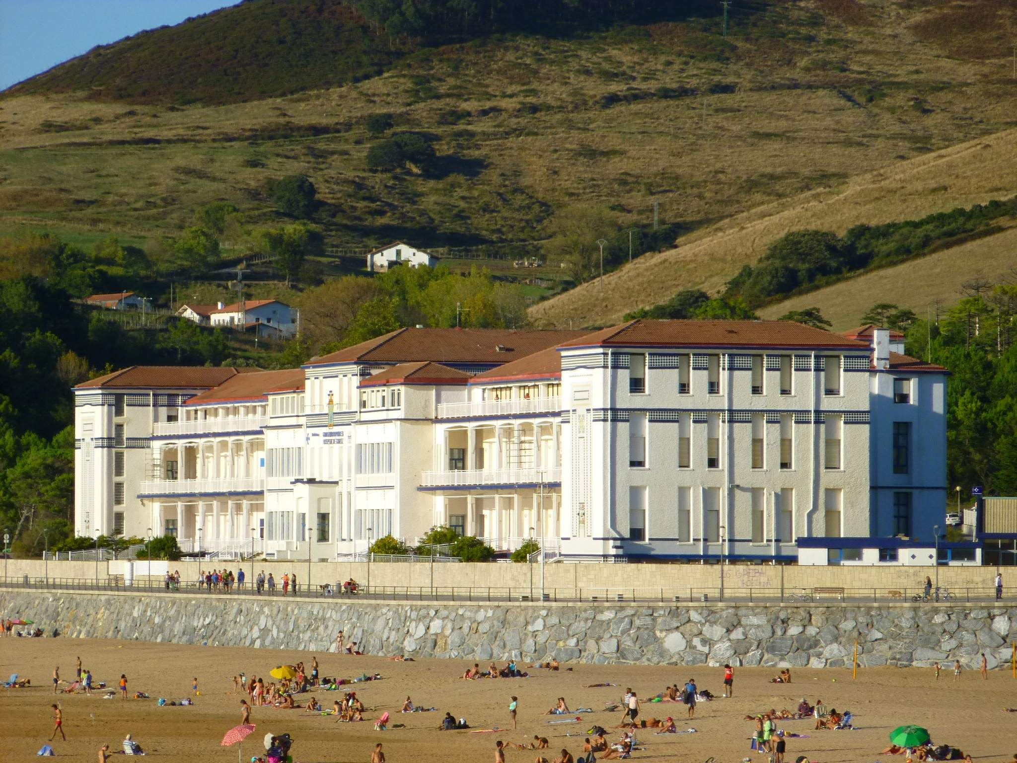 Hospital de Gorliz (Bizkaia)